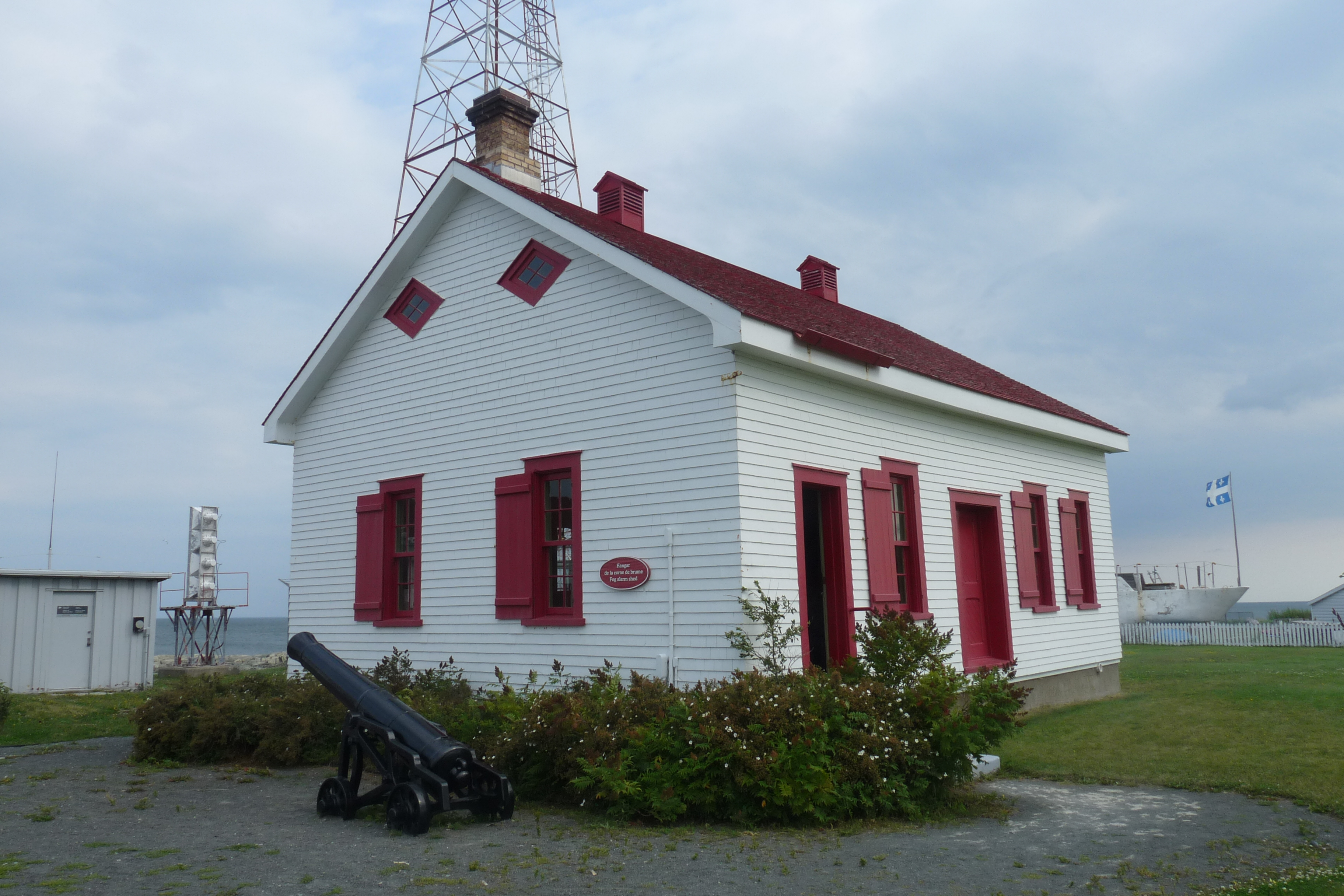 Le hangar de la corne de brume sur le site historique maritime de la Pointe-au-Père en 2011. Il a été reconnu édifice dédéral du patrimoine en 1990.